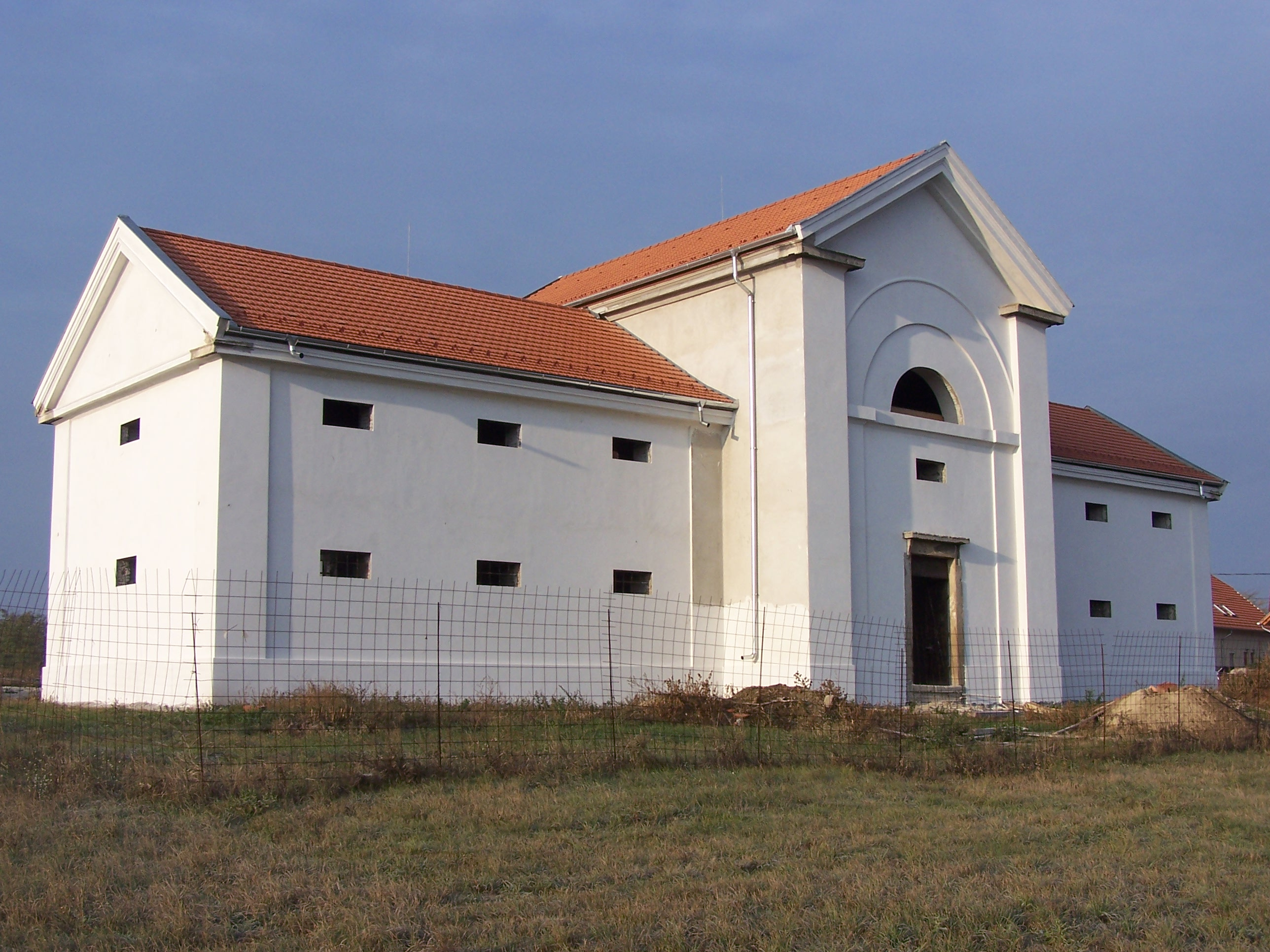 Magtár (Gyömrő, Teleki u. (volt Bajcsy-Zsilinszky u.)) This is a photo of a monument in Hungary, Identifier: 7069